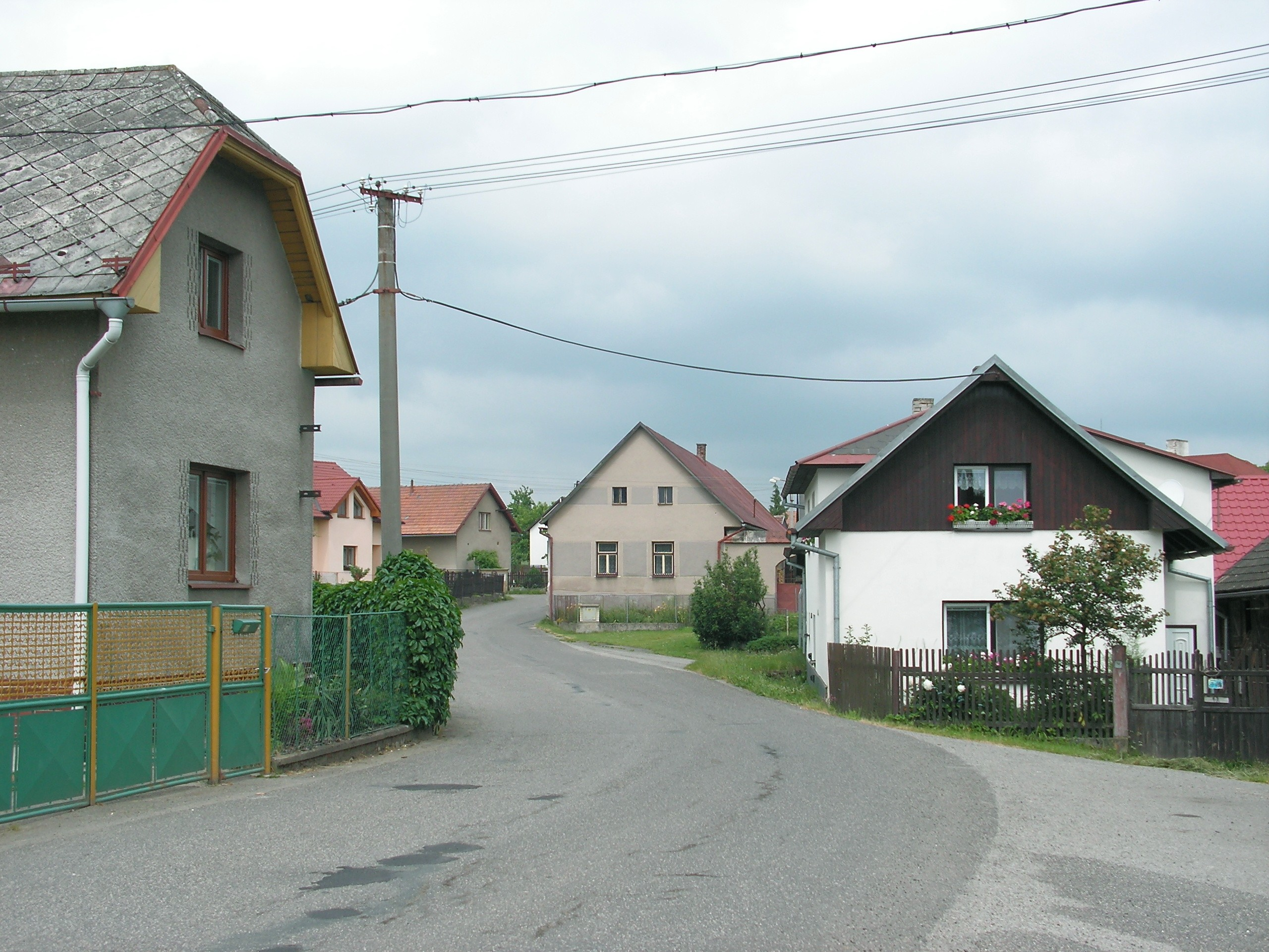 Česky: Obec Druhanov v okrese Havlíčkův Brod.